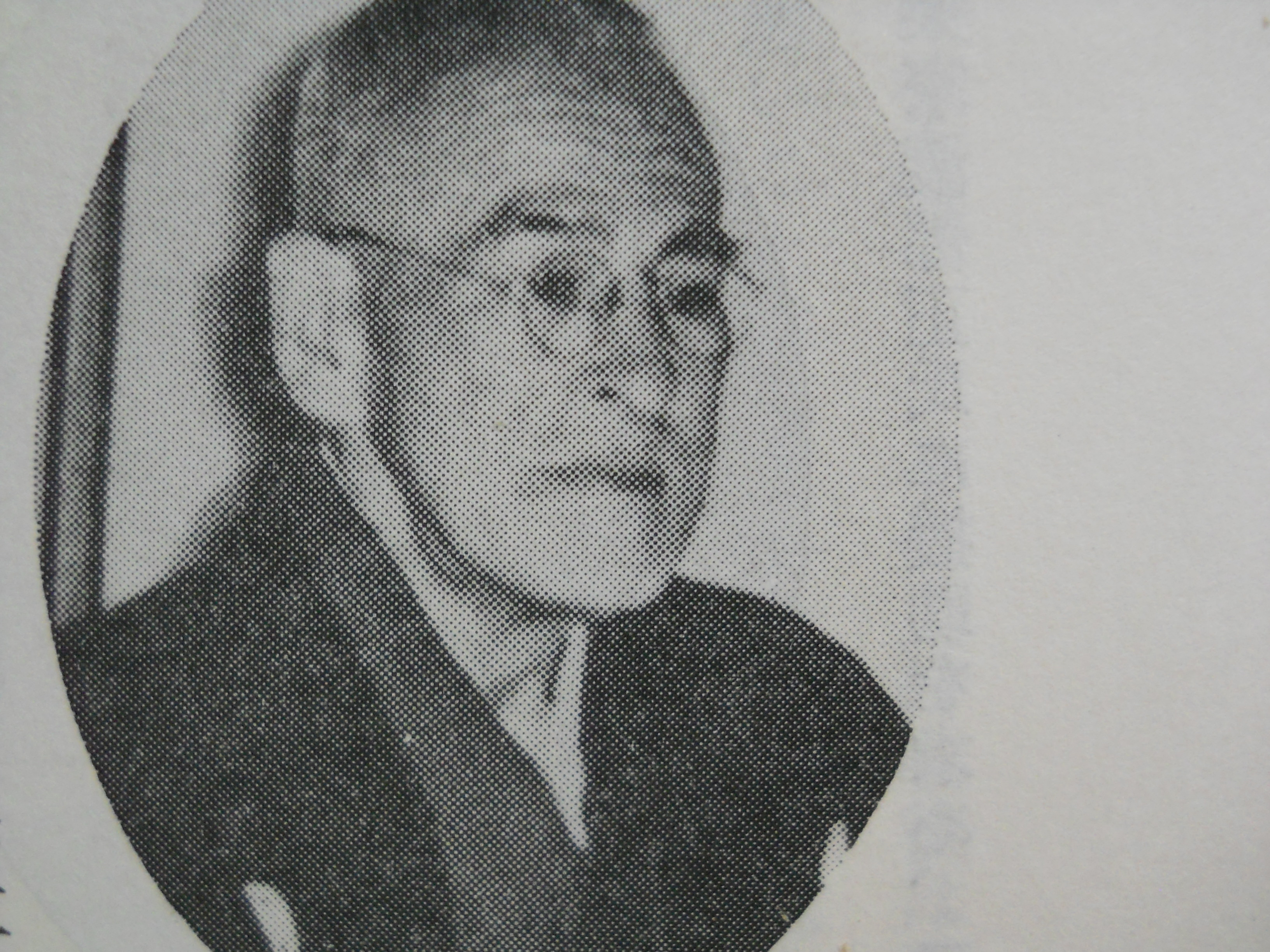 Shouzi Ren2